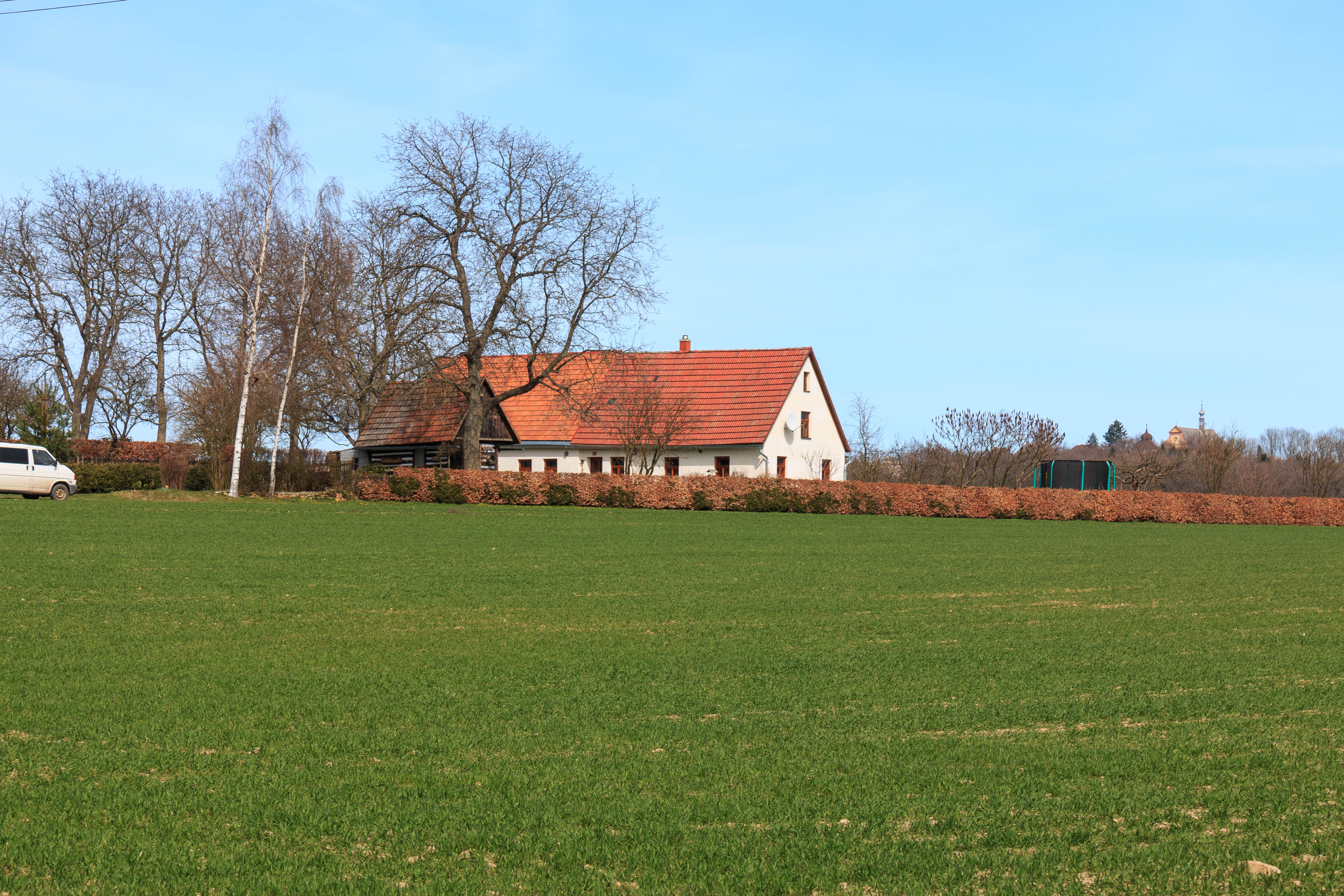 Končiny čp. 35